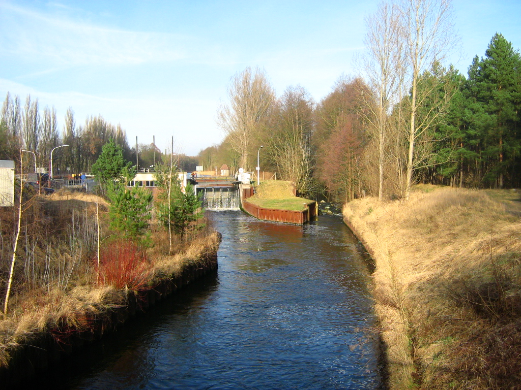 Das Döllnfließ entspringt in der Schorfheide und wird hier von mehreren kleinen Zuläufen gespeist. Früher mündete es in die Havel, bzw. kreuzte sie. Die Fortsetzung westlich der Havel ist heute der Fließgraben, der bei Oranienburg-Friedrichthal in die „Schnelle Havel“ mündet. Das Döllnfließ wird heute nach Erreichen des Vosskanals parallel neben diesem als Kanal nach Süden entlanggeführt. Bei der Schleuse Bischofswerder, wo die Wasserstände angeglichen sind, mündet es über eine Fischtreppe in den Vosskanal. Rechts im Bild die Mündung des Döllnfließes, links ein Wasserstandsregulierungswehr der Schleuse Bischofswerder.